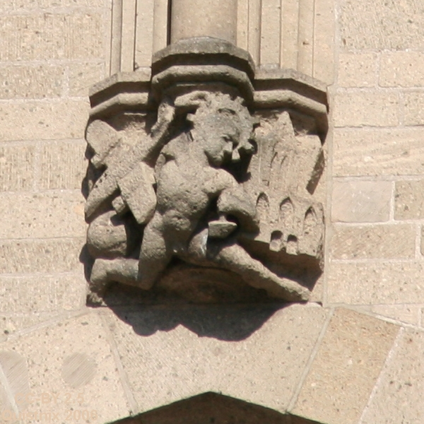 Detail van het beeldhouwwerk van de Eusebiuskerk in Arnhem, dat verwijst naar de verwoesting van de kerk door het bombardement. Eigen werk.